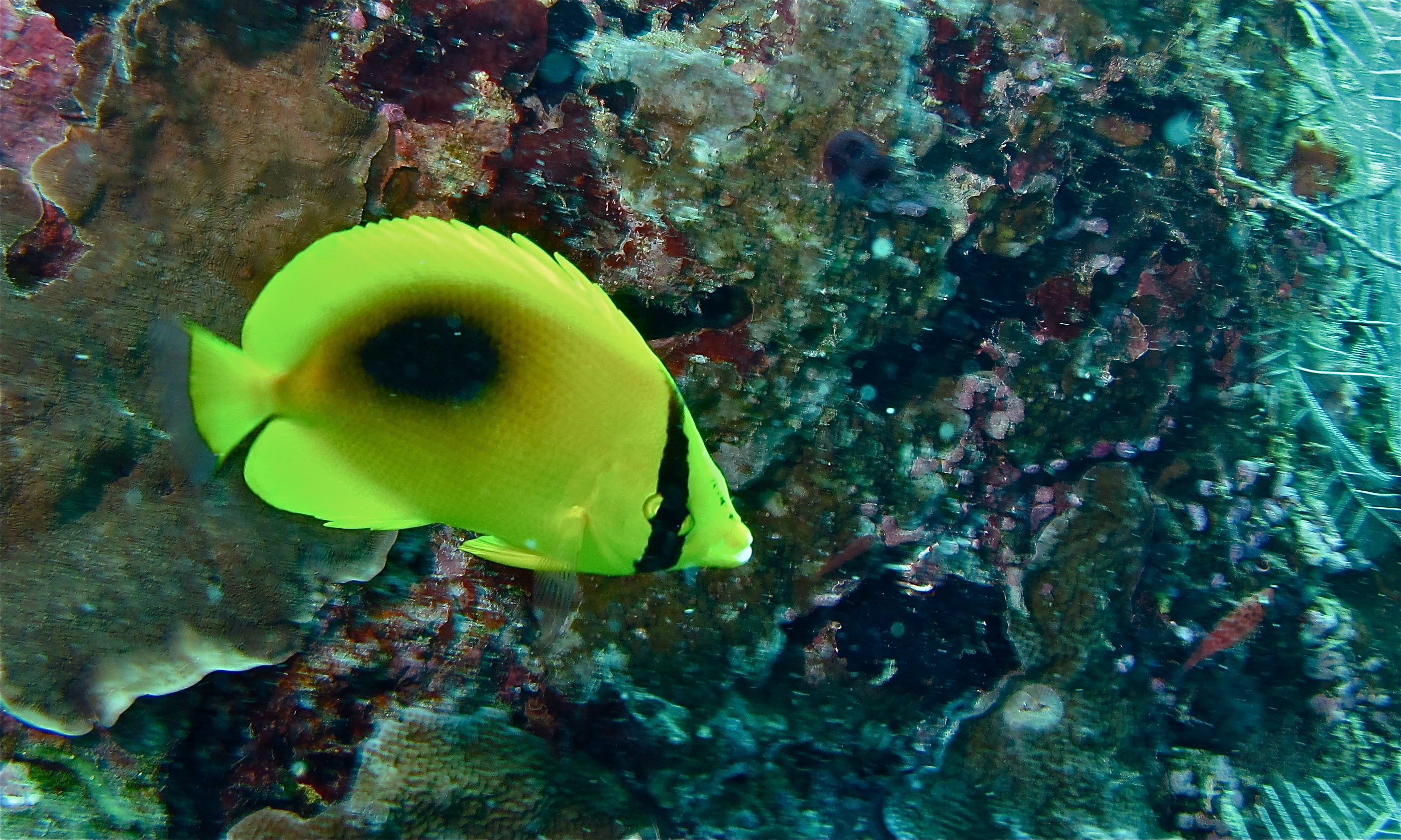 Barracuda Point, Sipadan, Sabah, MALAYSIA